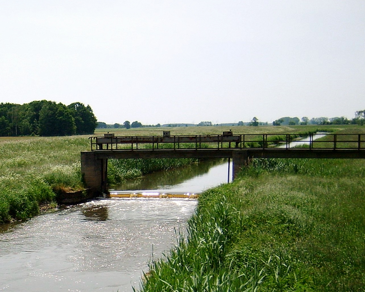 Die Röder kurz vor ihrem Eintritt in die Schwarze Elster.